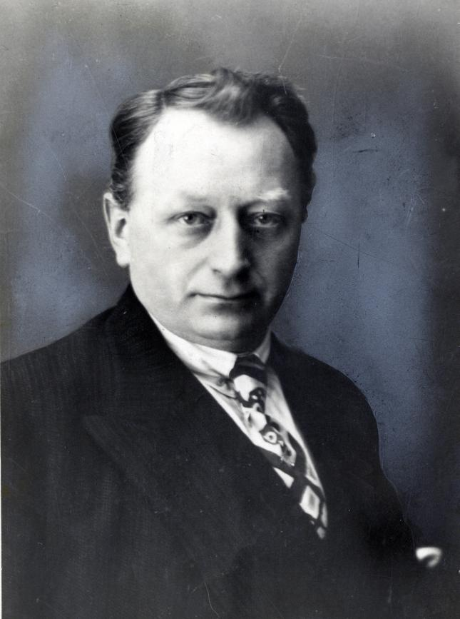 IJsselmuiden, J.J.W. (RKSP / KVP). Lid Eerste Kamer en van de Gemeenteraad. Portret.